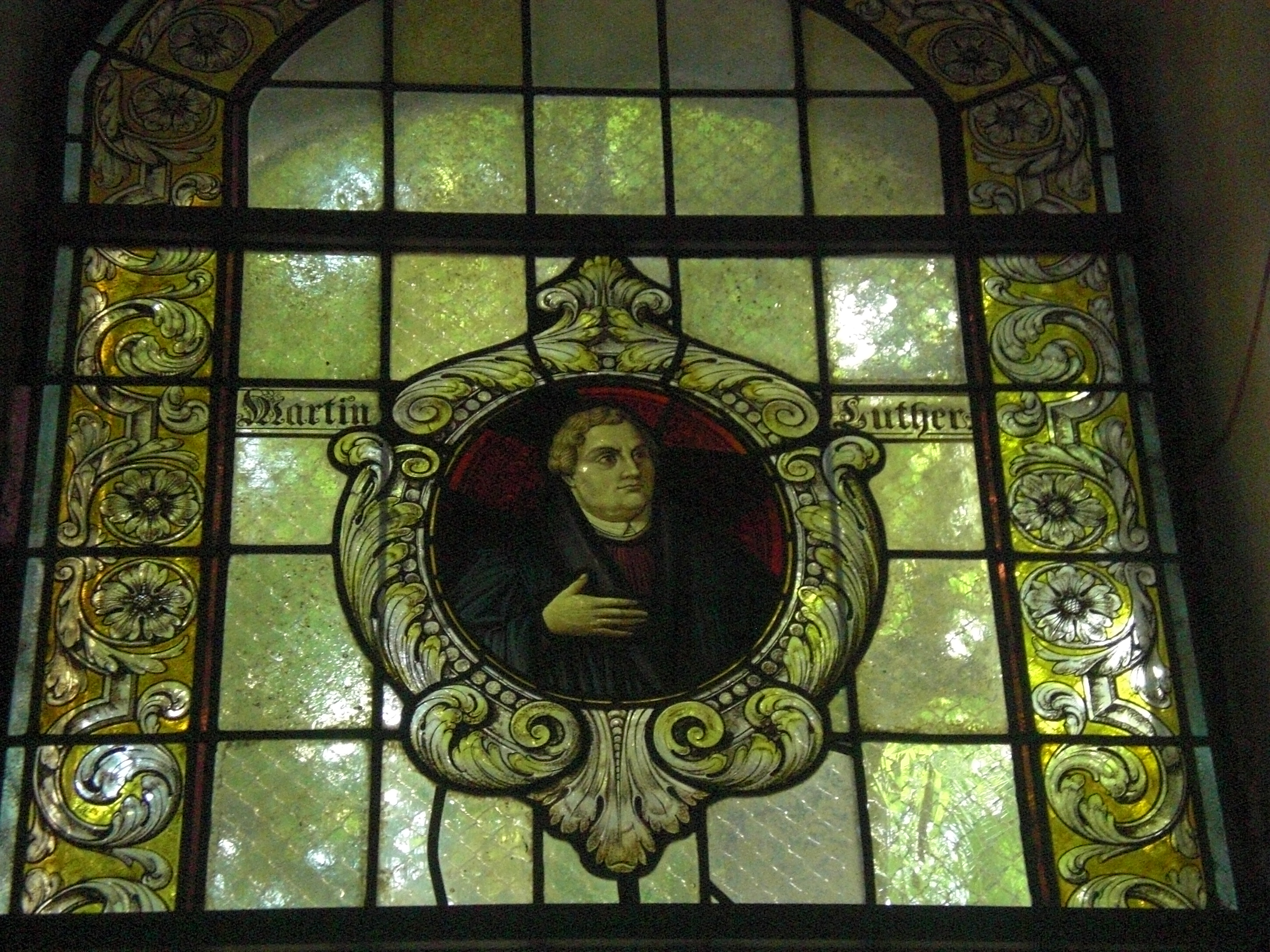 Lutero en vitralo de Goslar